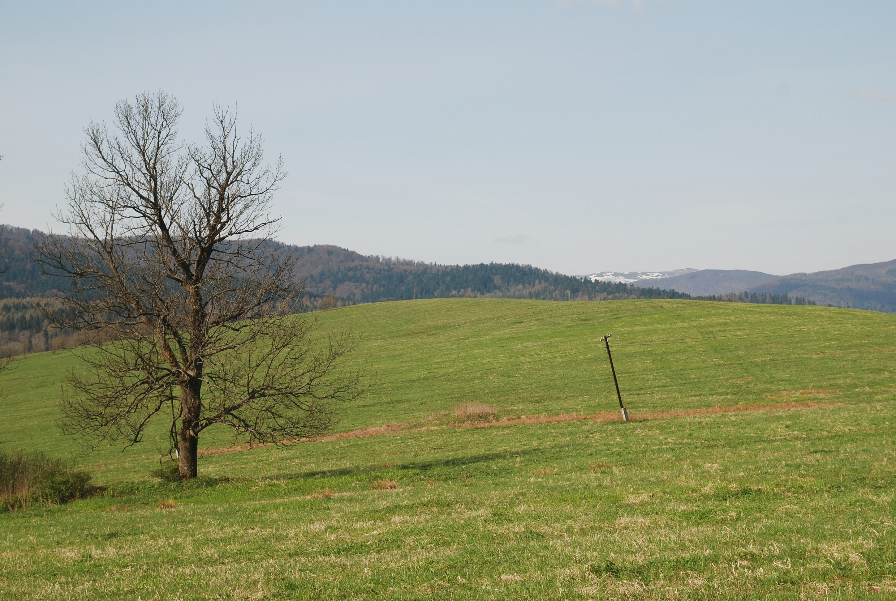 wieś Smolnik (powiat bieszczadzki)